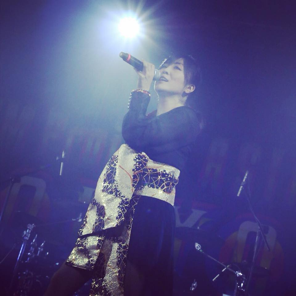 Cantando